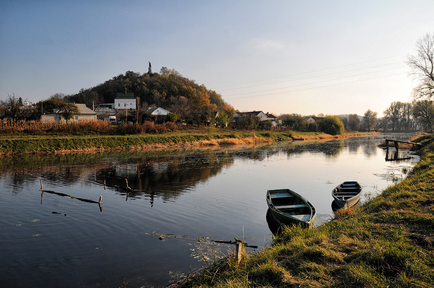 Замкова гора в Чигирині з протилежного берега Тясмину